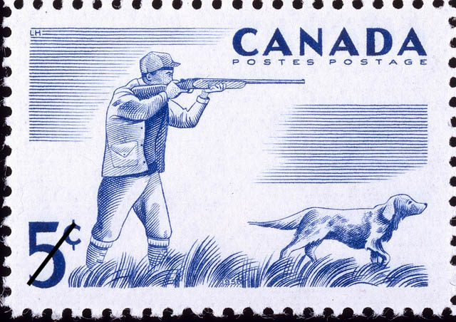 Timbre Poste Canada 5 cents Chasse 1957